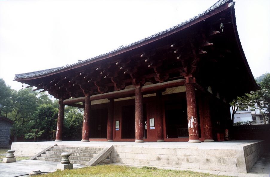 华林寺大殿正面侧拍。